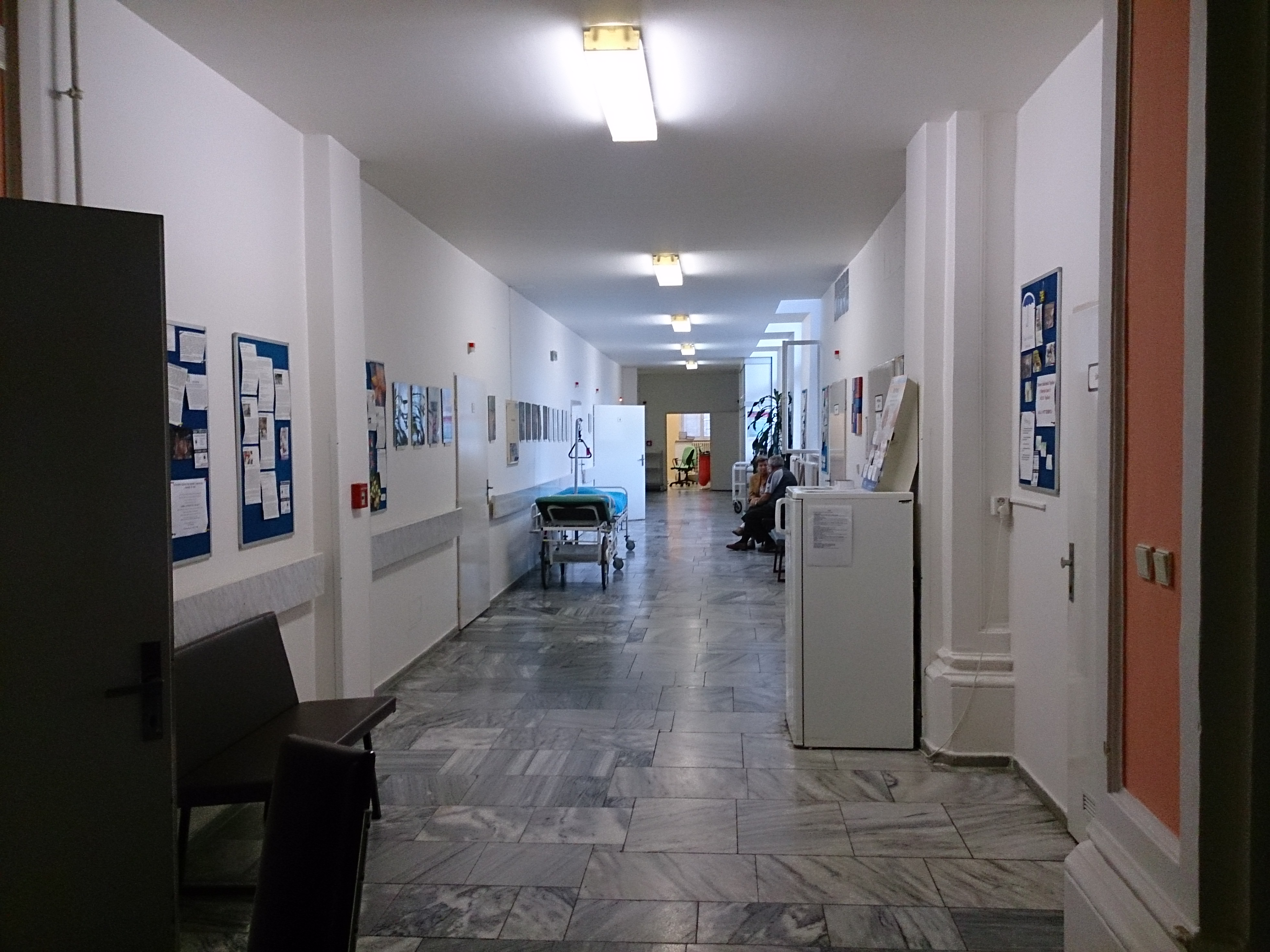 neurologické oddělení, ochoz.